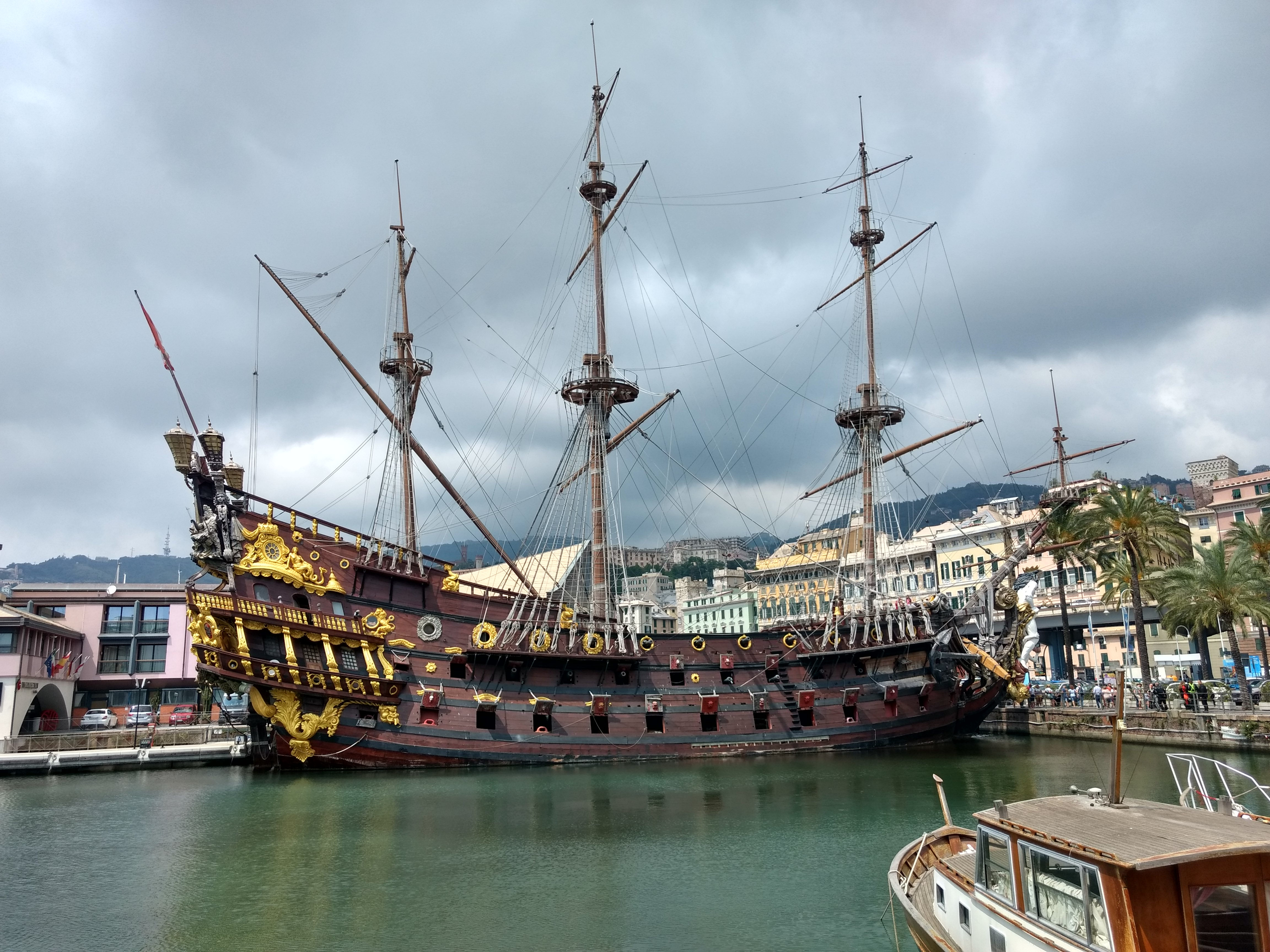 Galleon Neptune in Genova